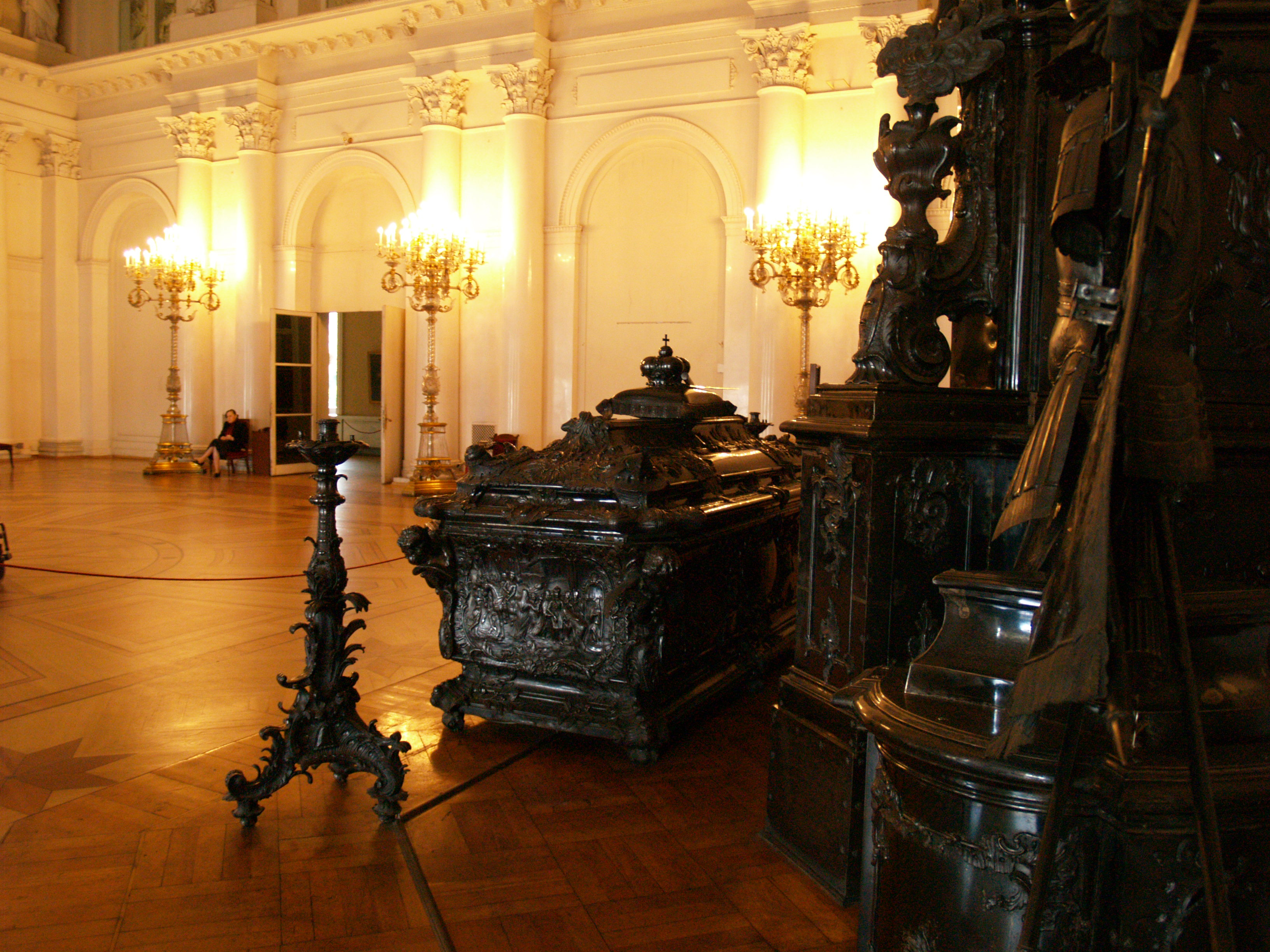 Серебряная рамка Александра Невского, Эрмитаж